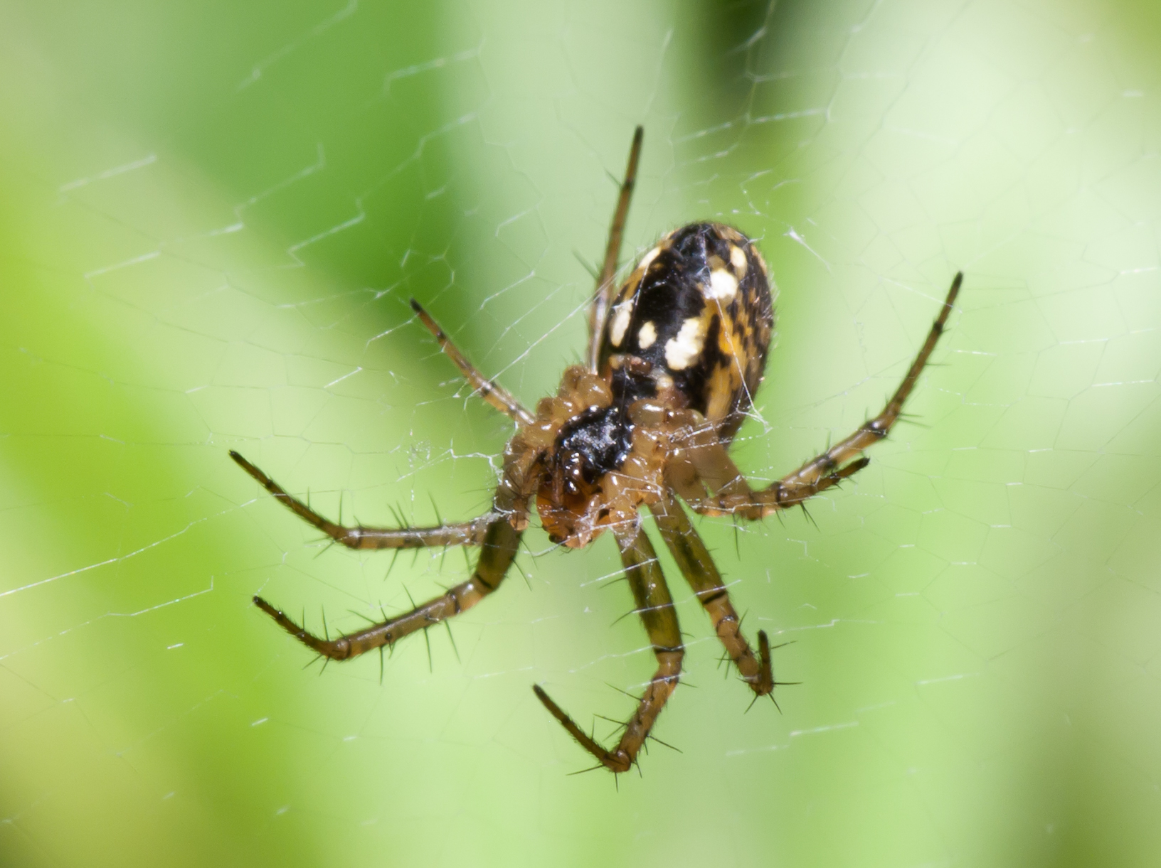 Araña (Mangora acalypha) en Bastavales, Brión, Galiza